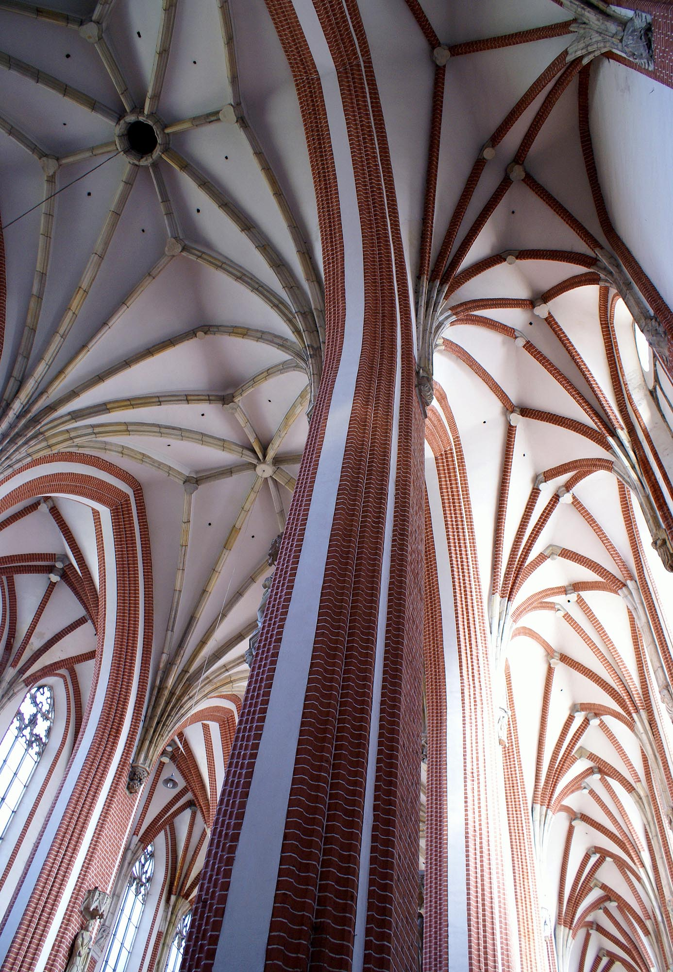 Wrocław, kościół par., ob. garnizonowy p.w. św. Elżbiety, 1 ćw. XIV, 1486